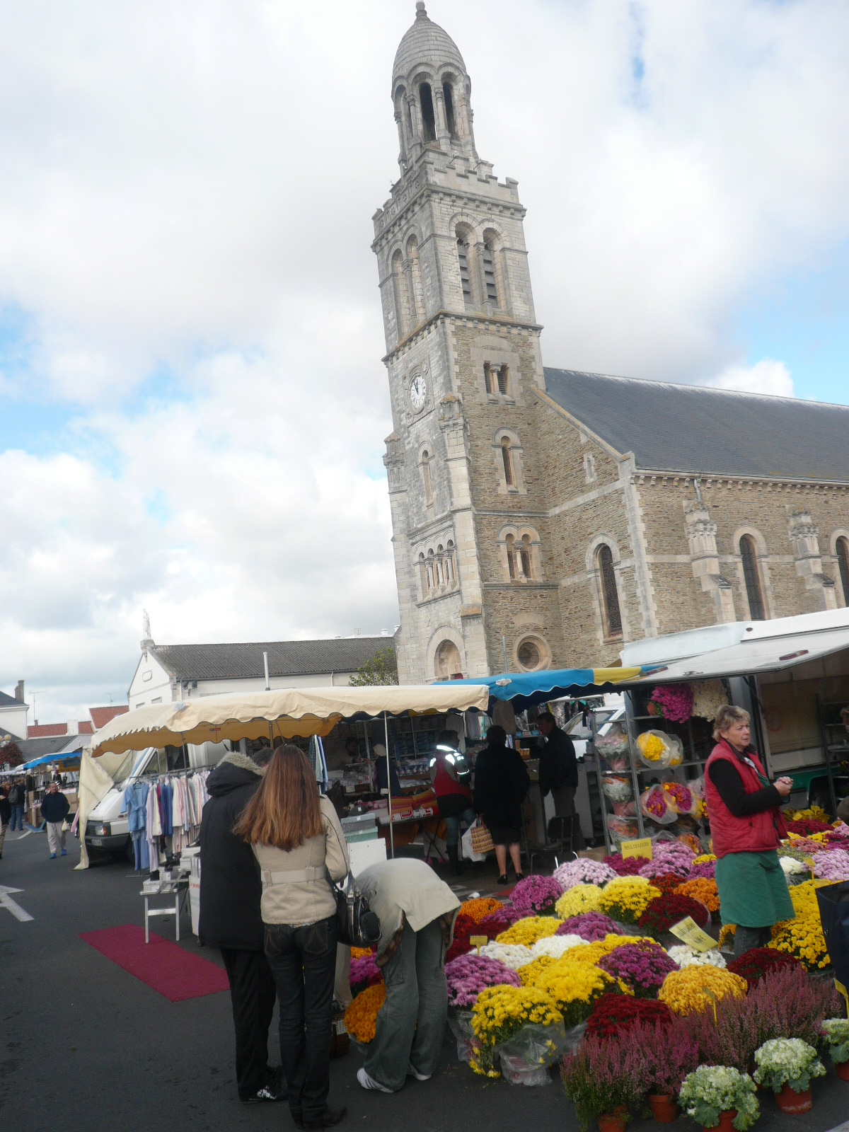 Saint-Gilles-Croix-de-Vie dans le département de la Vendée (France) : Marché côté Croix-de-Vie en octobre 2008. À l'arrière-plan : l'église Sainte-Croix.